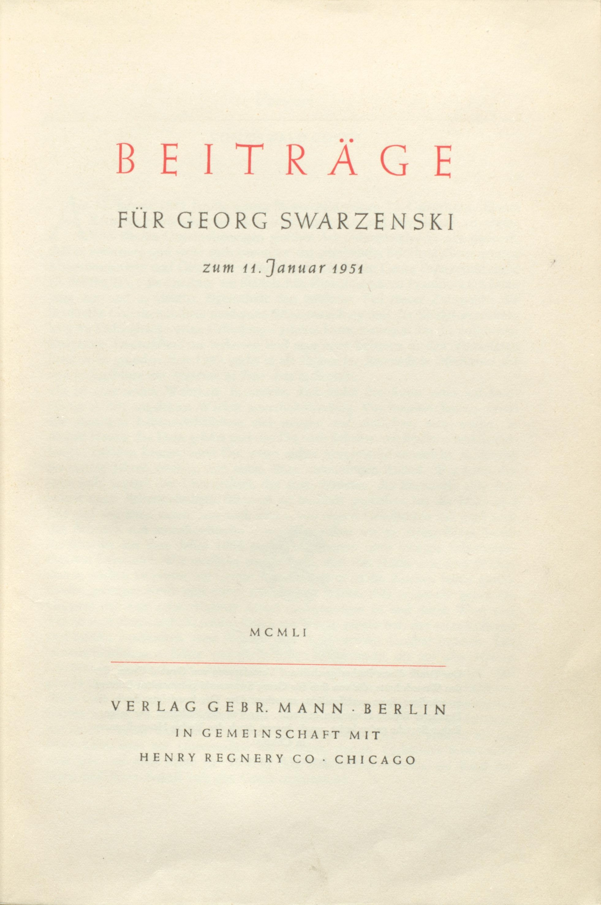 Oswald Goetz (Hrsg.) Beiträge für Georg Swarzenski zum 11. Januar 1951. Berlin : Mann, 1951